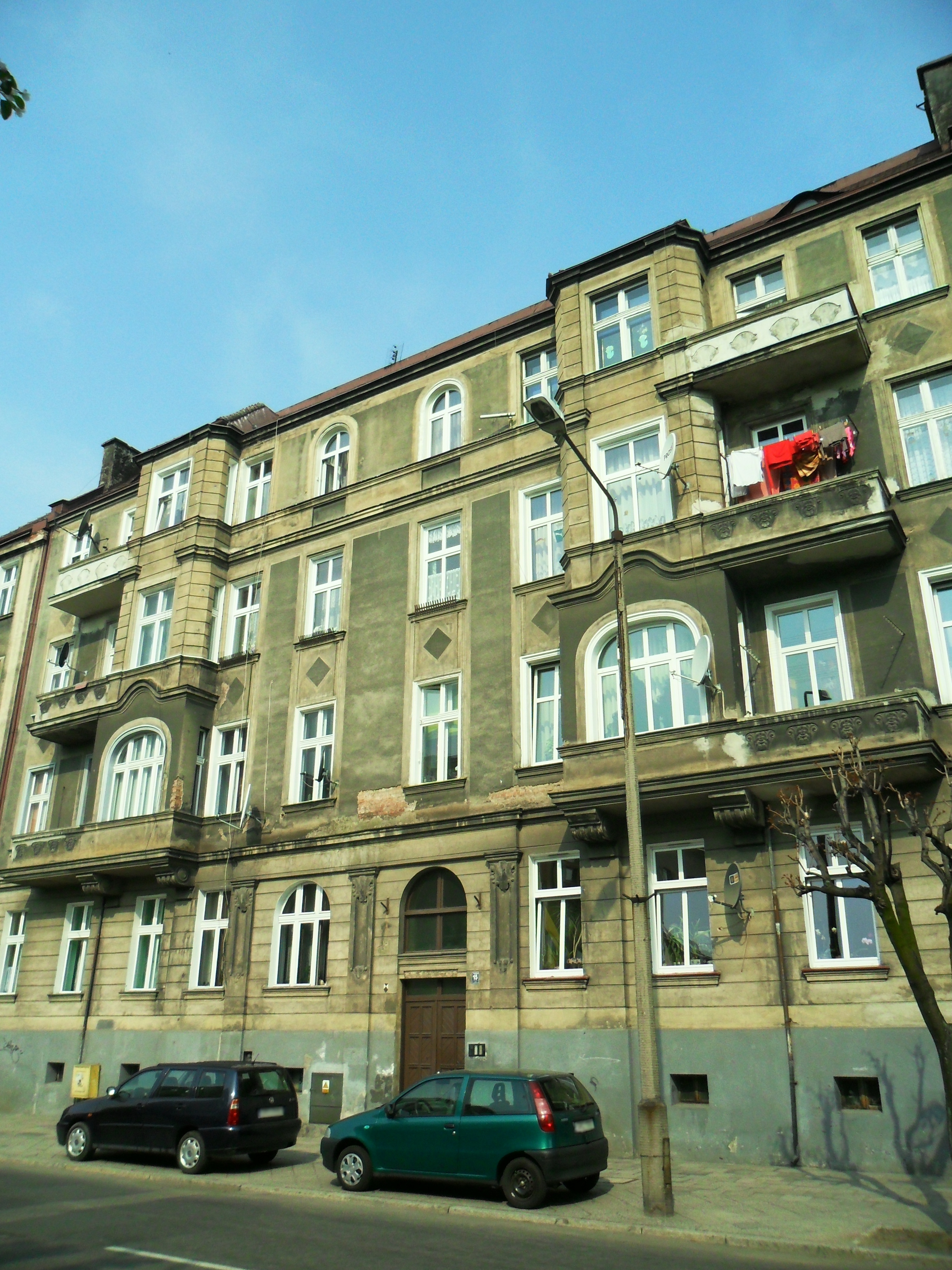 Kamienica przy ulicy Wileńskiej 15 w Raciborzu